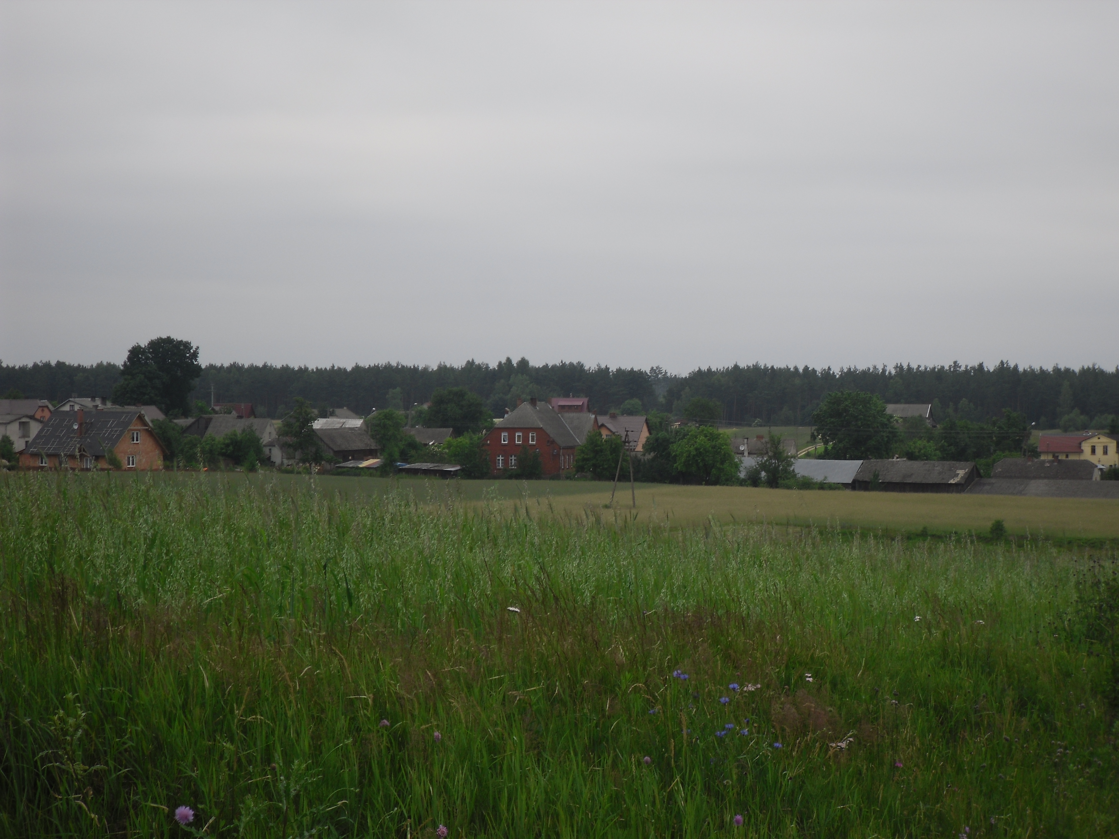 Przytarnia